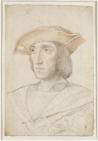 Joconde database: entry 50520001556